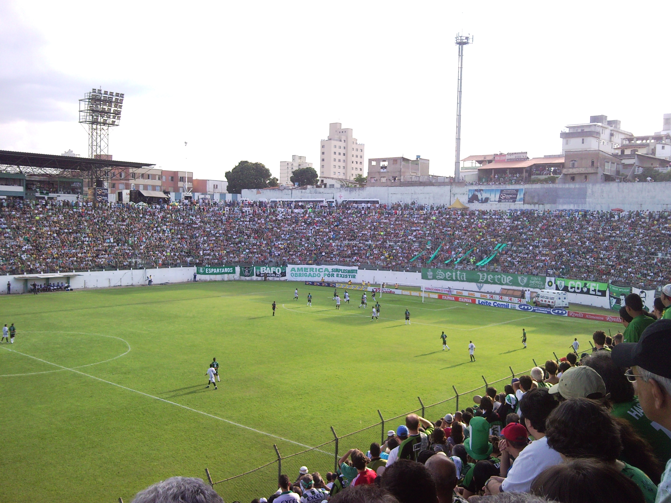 Estadio Raimundo Sampaio 2009